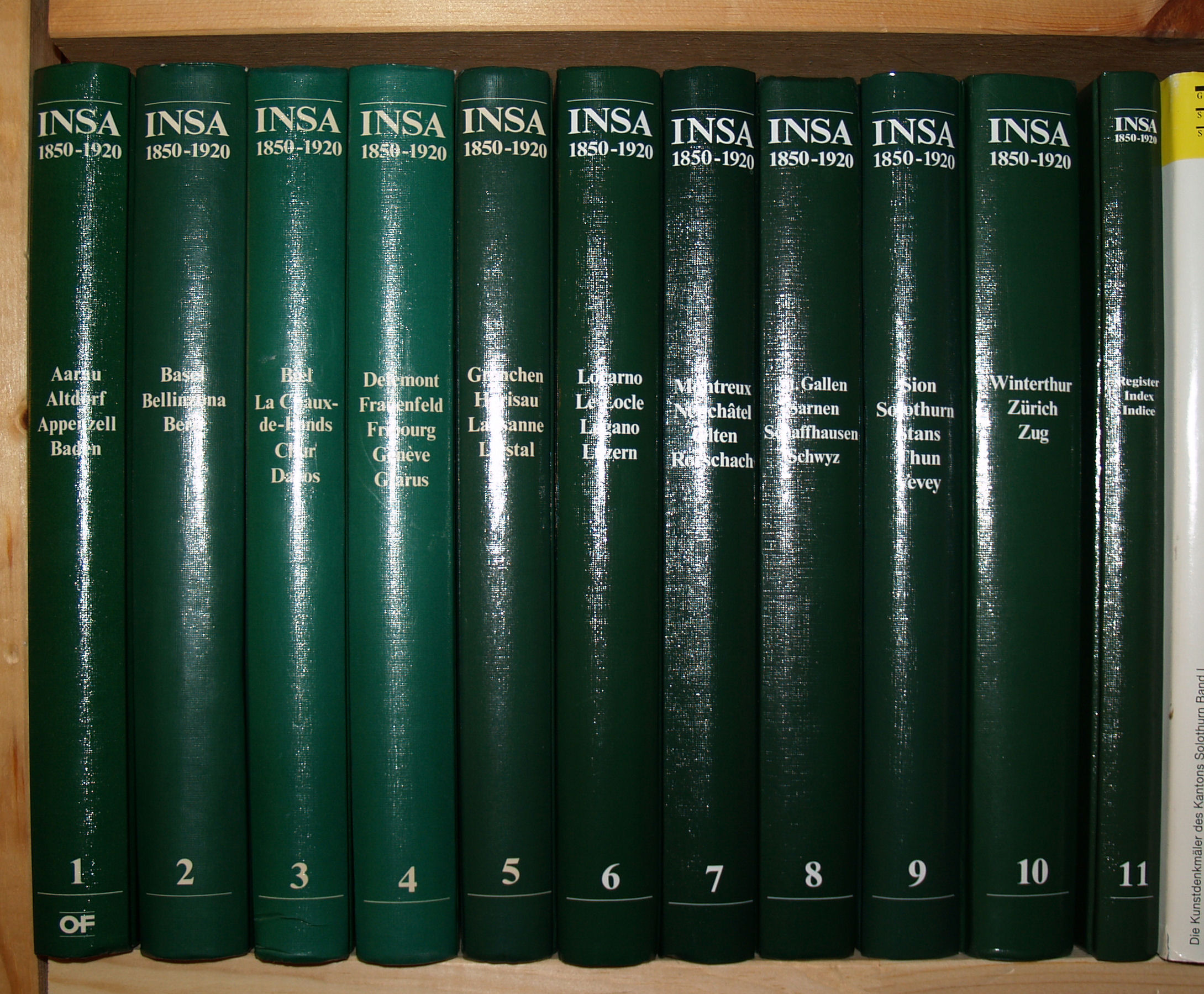 Die Buchrücken der kompletten Buchreihe “Inventar der neueren Schweizer Architektur”